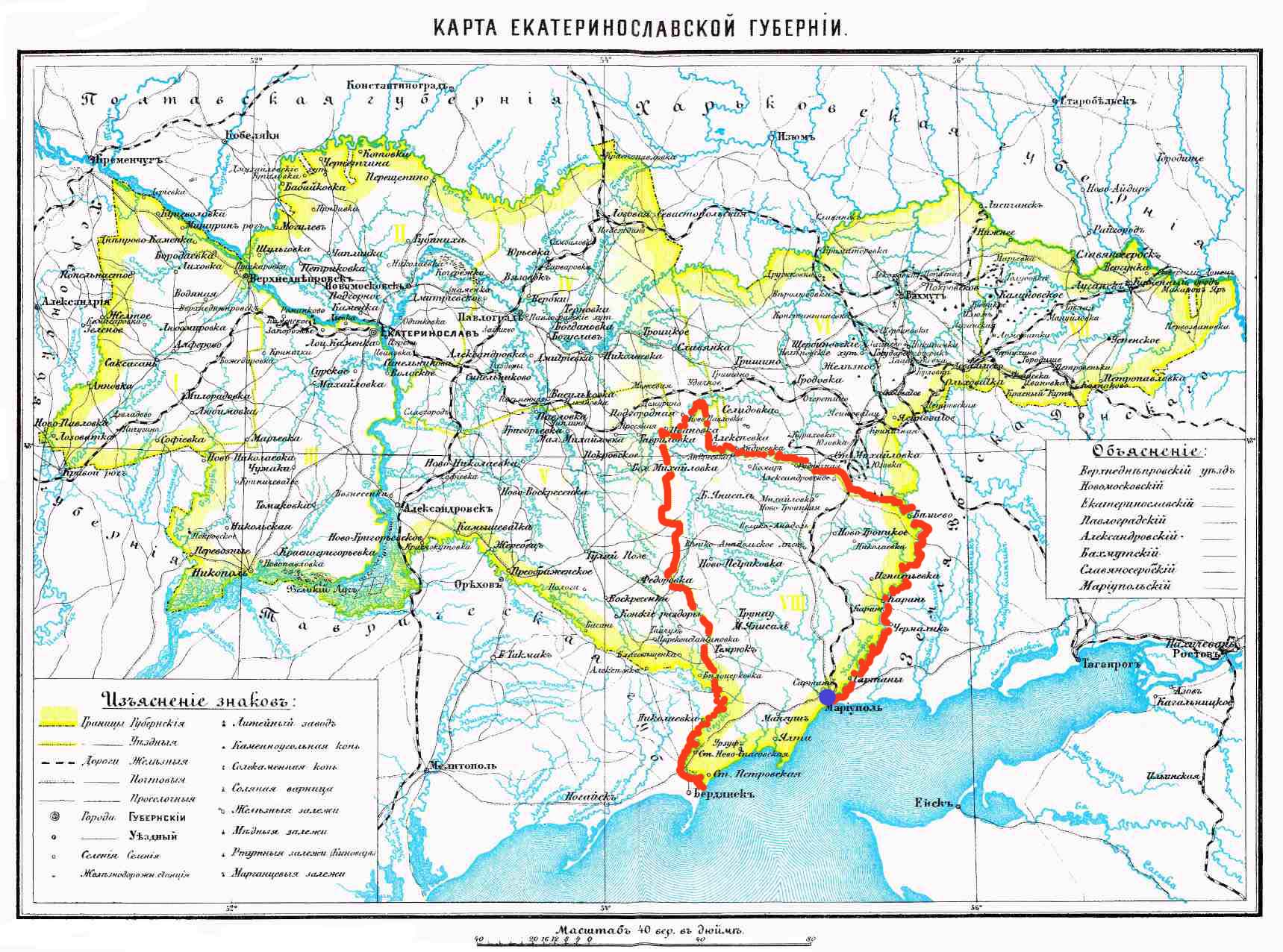 Административное деление Екатеринославской губернии. Красным выделена граница Мариупольского уезда, синей точкой отмечен город Мариуполь